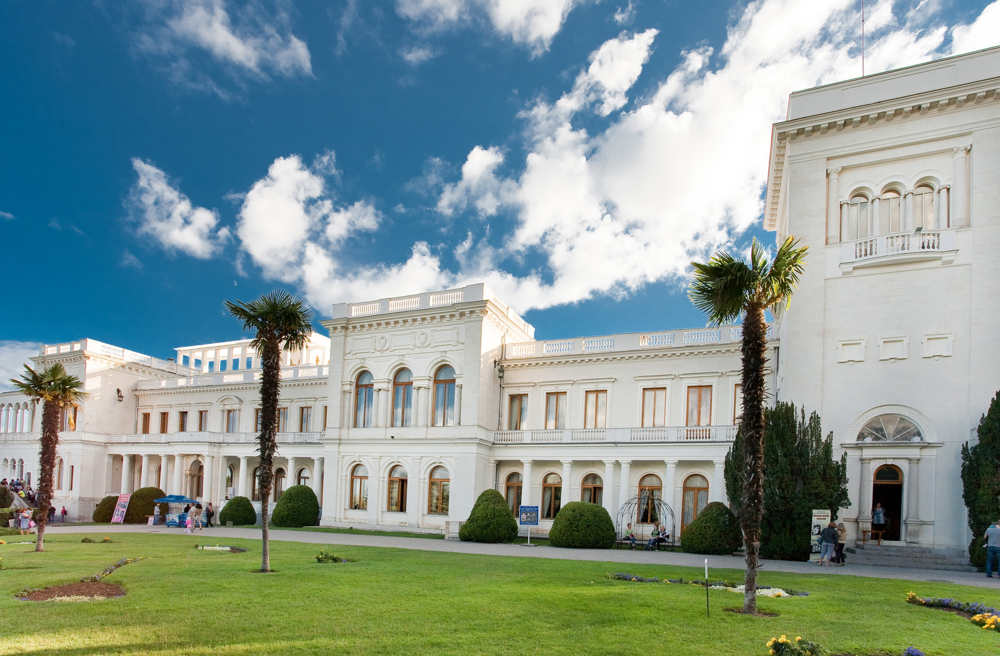 Лівадія вул. Батурина, 44